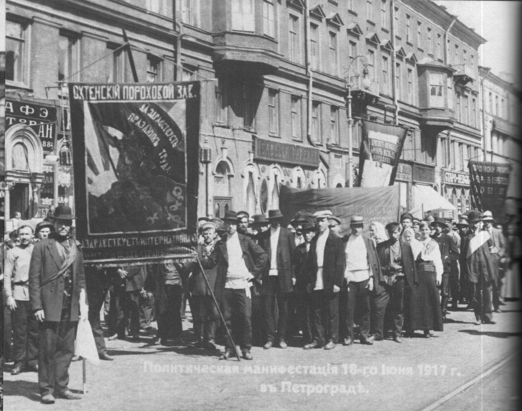 Manifestación del Sóviet de Petrogrado del 1 de julio de 1917.